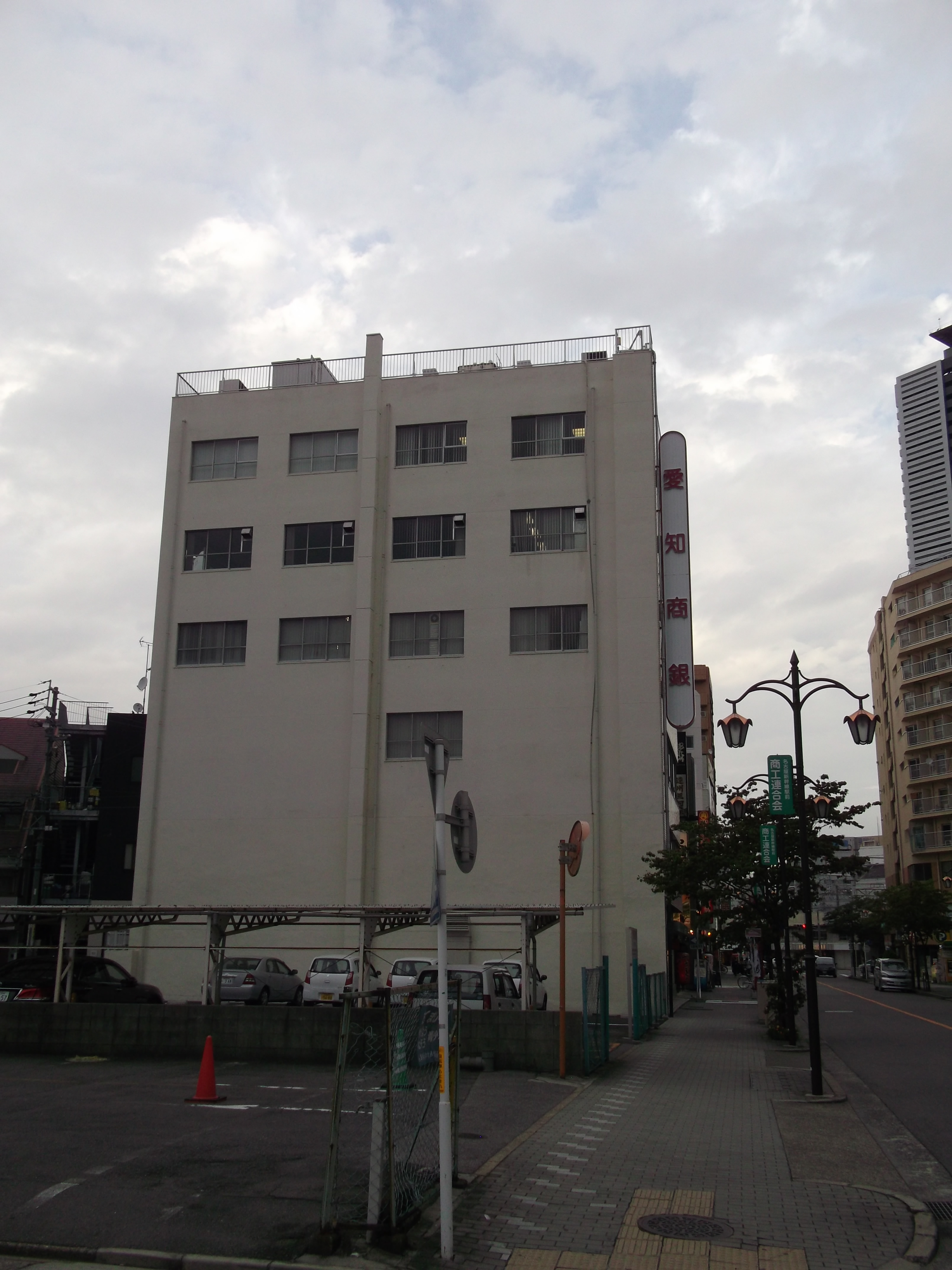 名古屋市中村区則武の信用組合愛知商銀本部・本店を南側より撮影